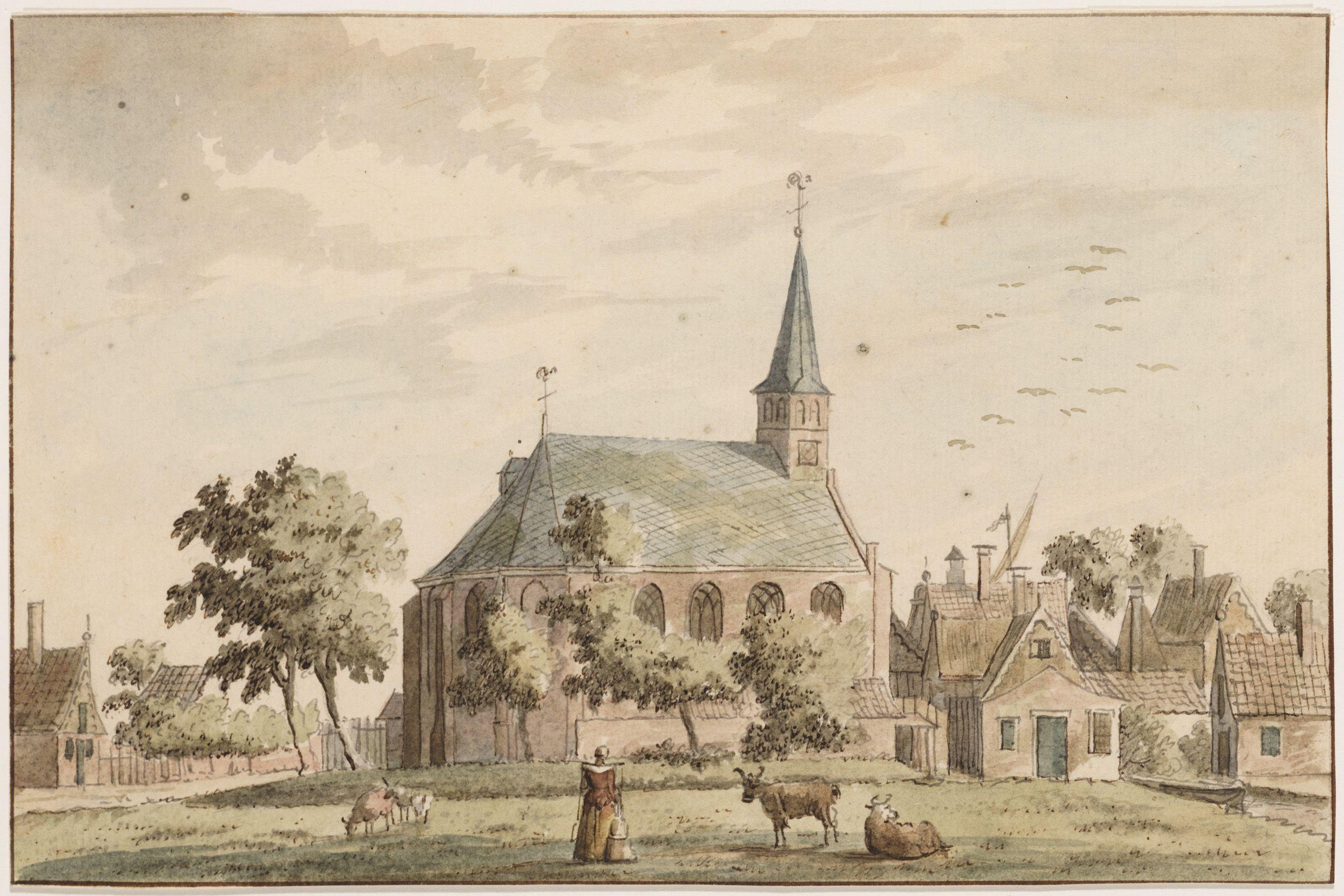 Beschrijving Nieuwendam Documenttype tekening Vervaardiger Onbekend Anoniem Collectie Collectie Koninklijk Oudheidkundig Genootschap Datering 1700 t/m 1800 Geografische naam Nieuwendam Inventarissen Afbeeldingsbestand KOG-AA-2-35-928 Generated with Dememorixer